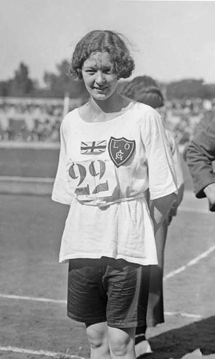 20-8-22, [stade] Pershing, [à d.] Miss Hatt, gagnantes du saut en hauteur [meeting international d'athlétisme féminin] : [photographie de presse] / [Agence Rol]